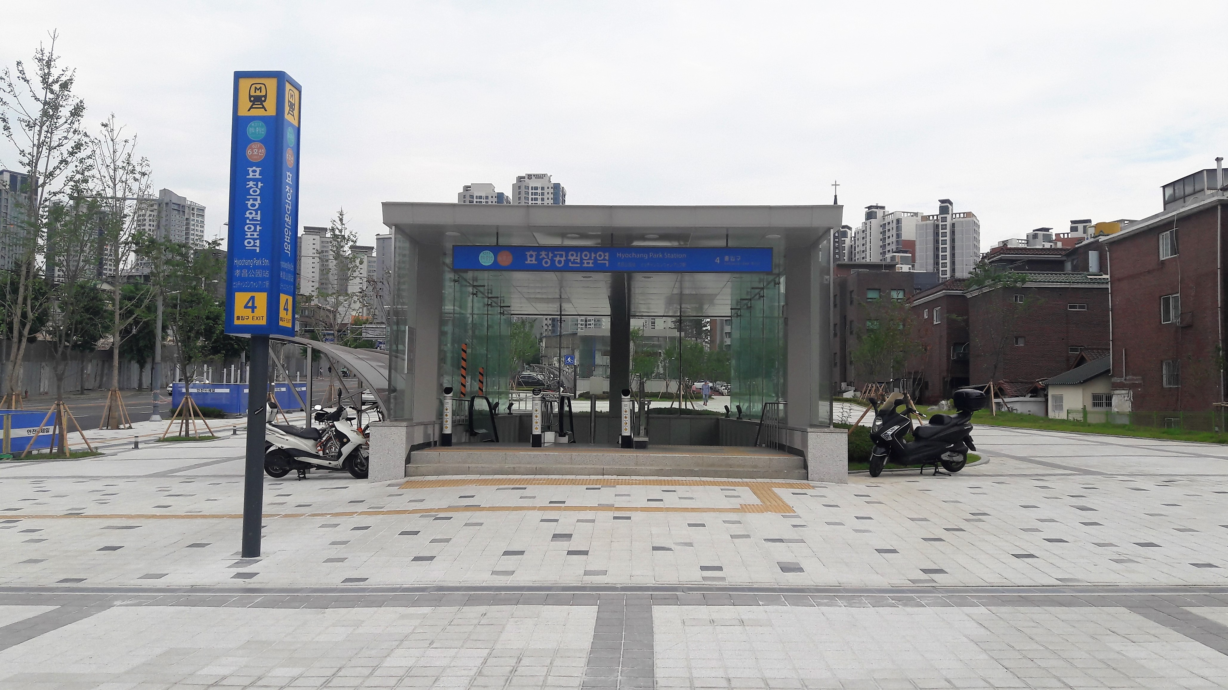 수도권 전철 경의중앙선 효창공원앞역 4번 출구